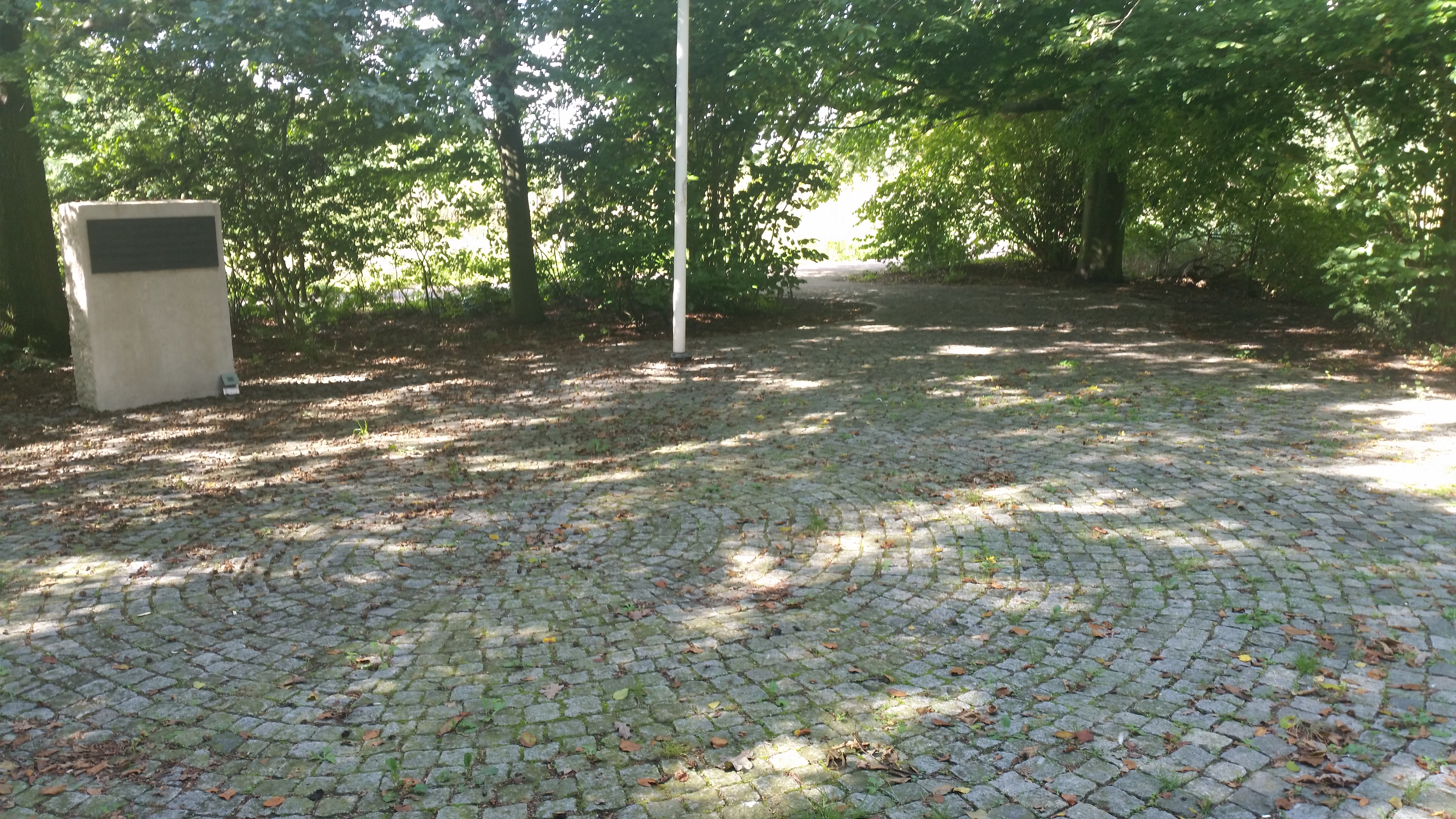 Rozenoord (Amsterdam)